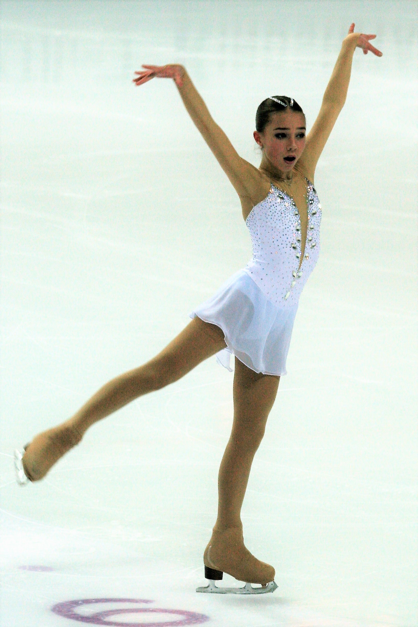 Елизавета Нугуманова (Россия) на финале Гран-при по фигурному катанию среди юниоров 2016-2017